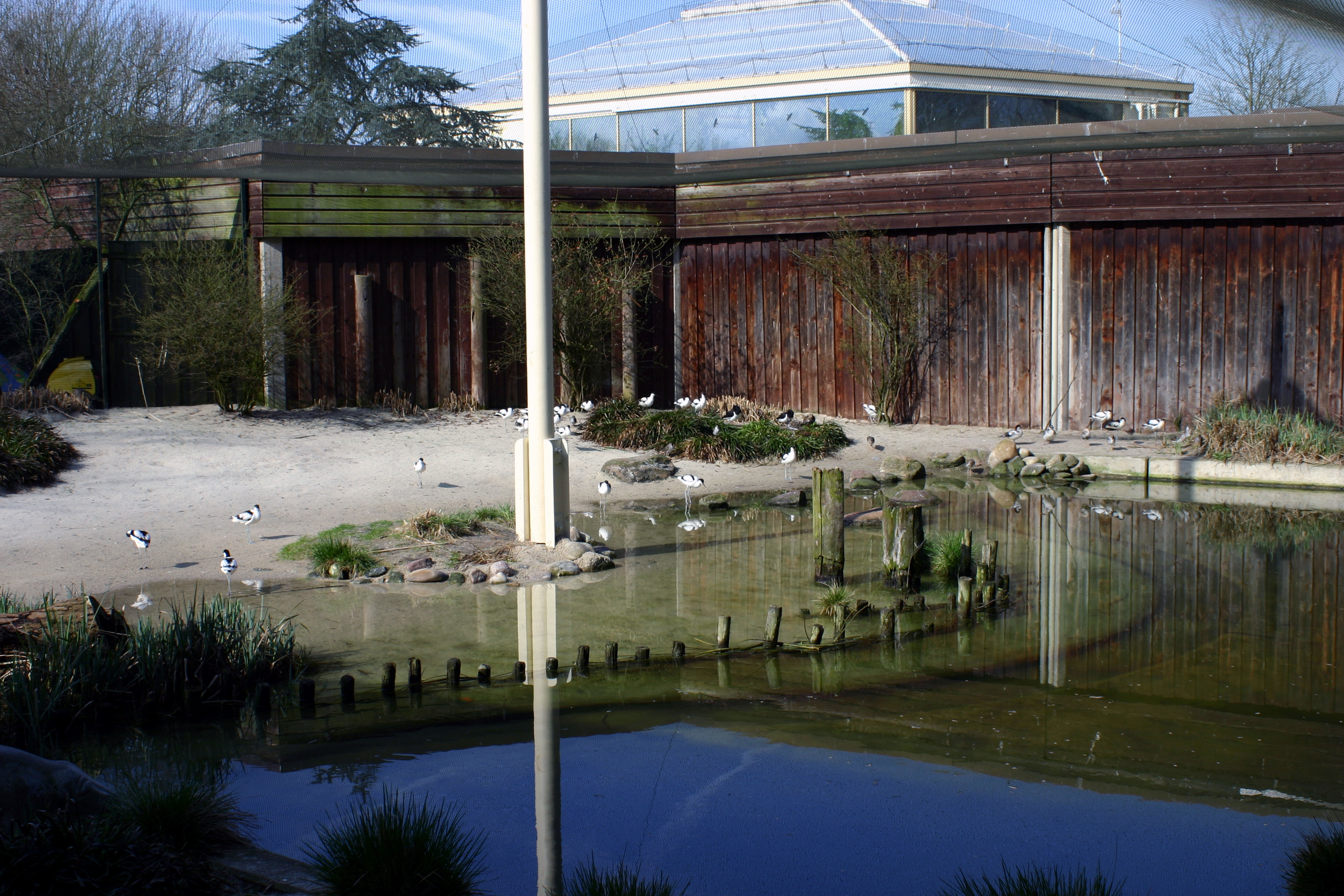 Watvogelanlage